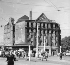 Ruine des Palasthotels Weber am Postplatz in Dresden